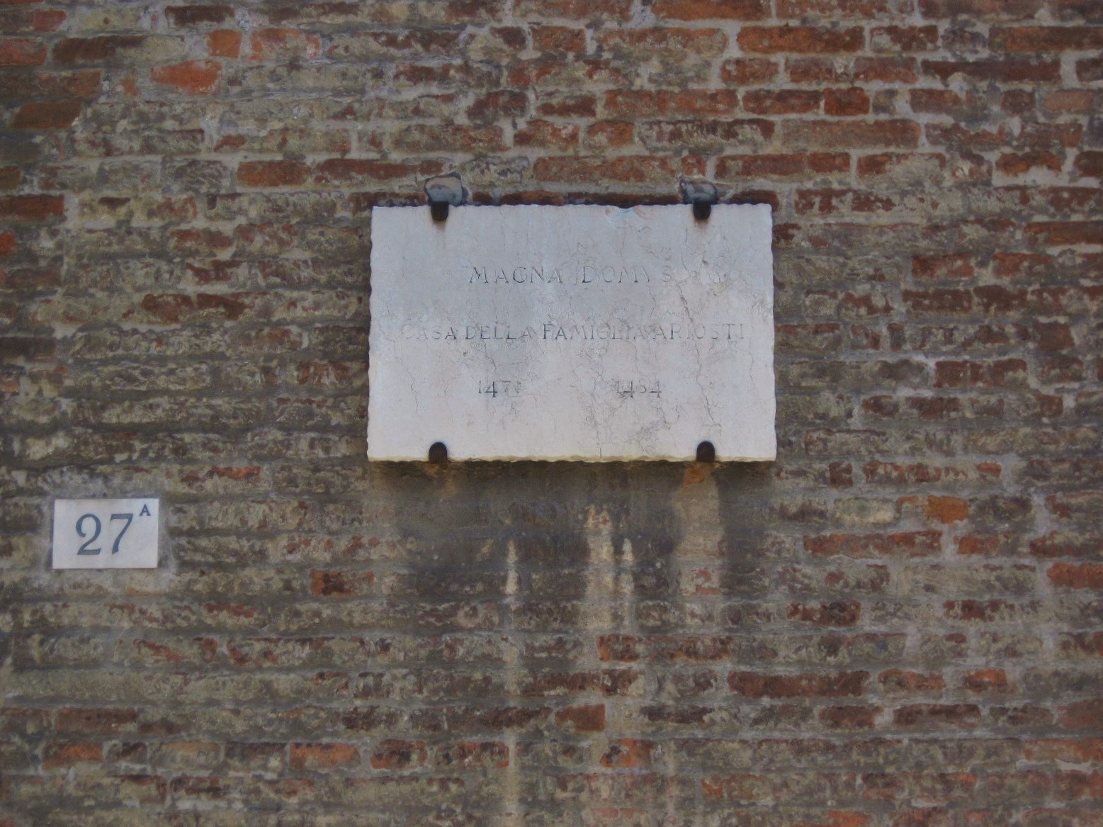 lapide famiglia Ariosti